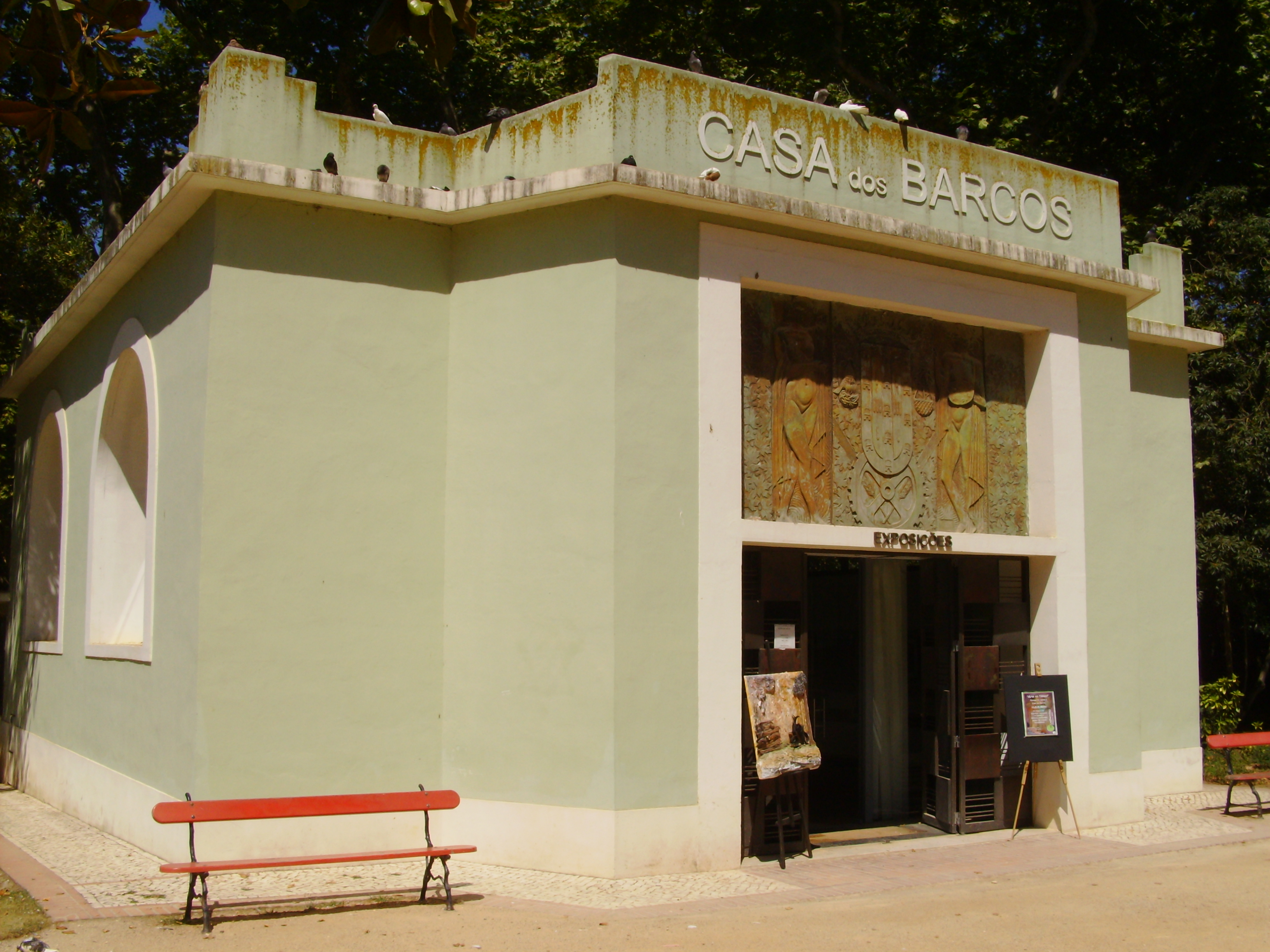 Parque D. Carlos I, Caldas da Rainha, Distrito de Leiria, Portugal: Casa dos Barcos.